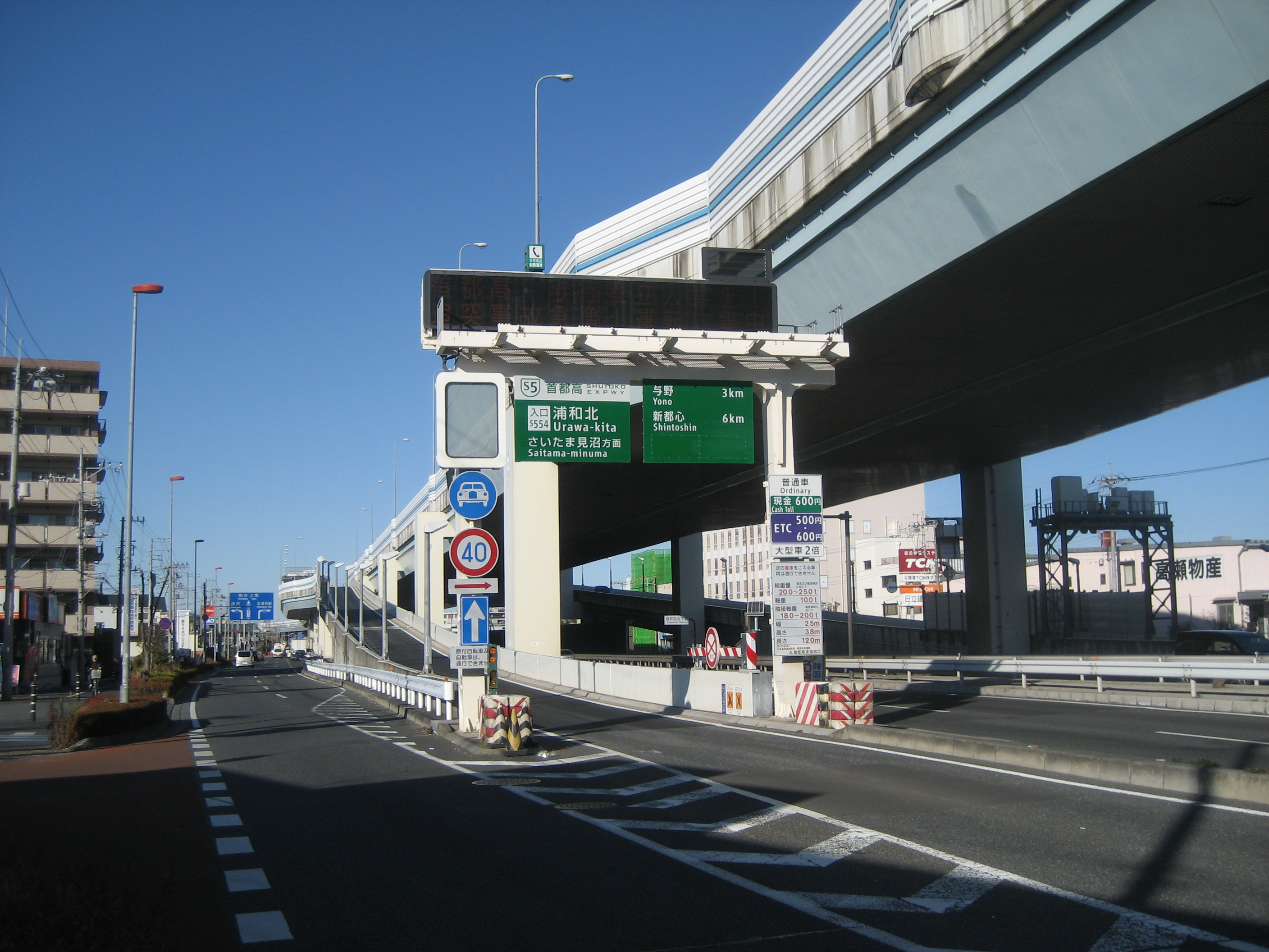 首都高速埼玉大宮線浦和北入口